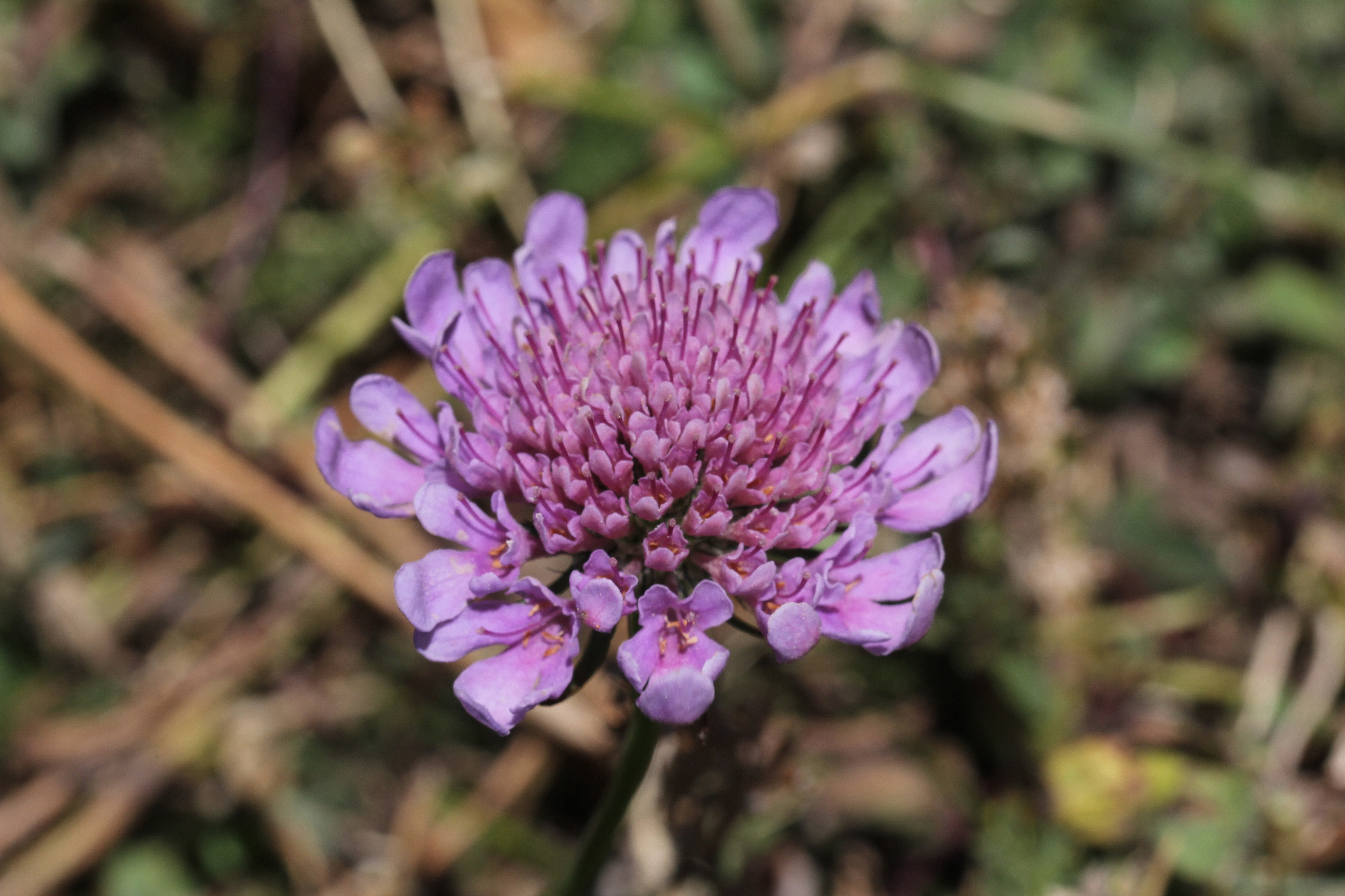 Knautia nevadensis